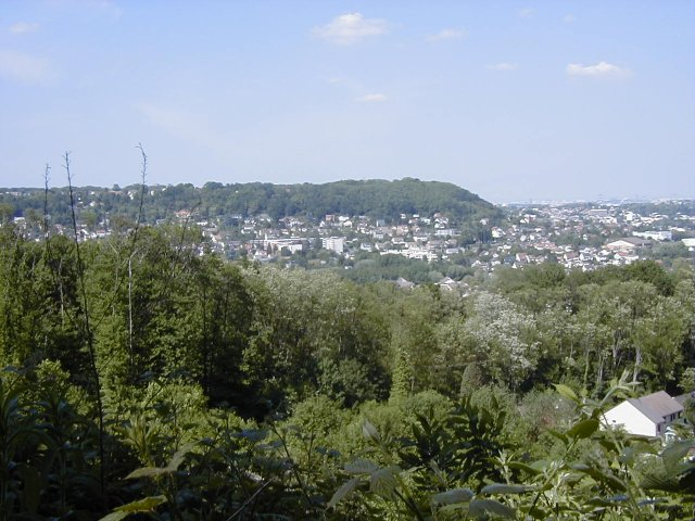 Vallée de l'Yvette, photo prise au niveau de la commune de Villebon-sur-Yvette.